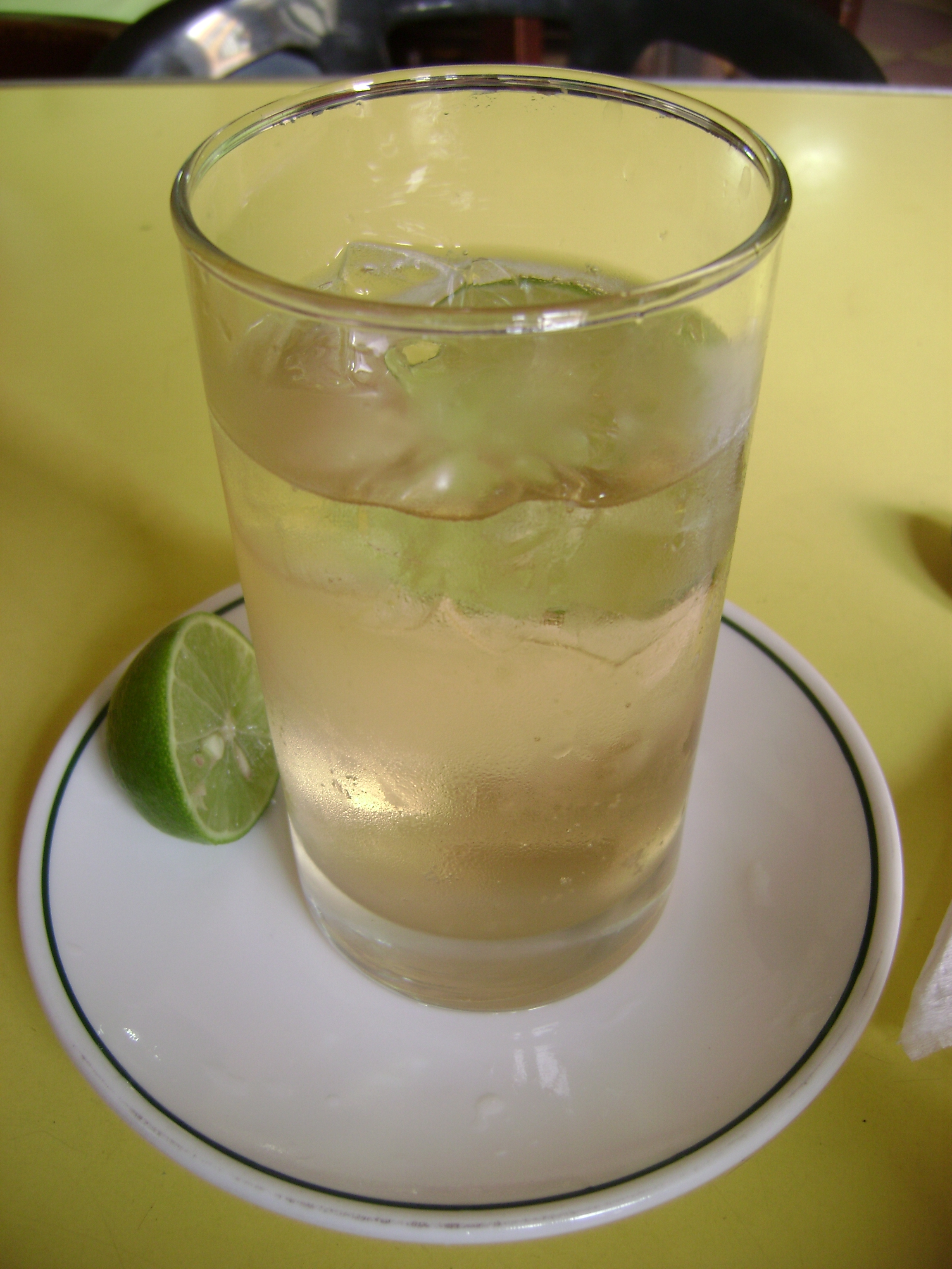 Chilcano de Pisco.